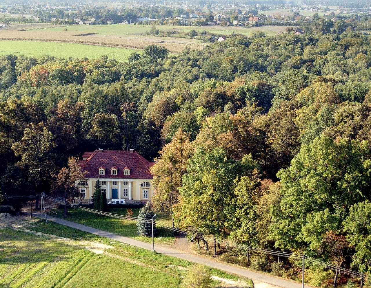 Poręba, pałacyk Bażantarnia, 1800